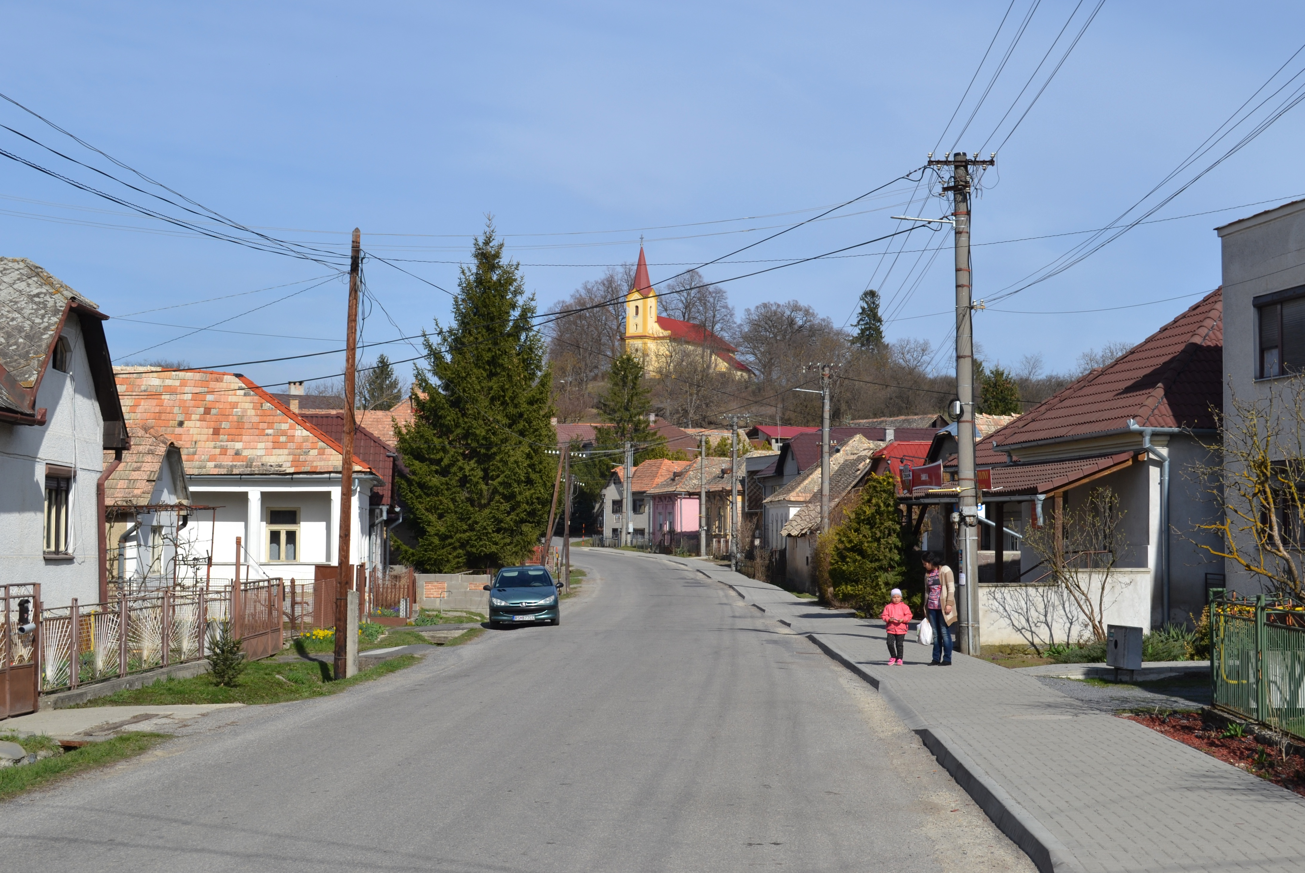 Ulica obce Husiná